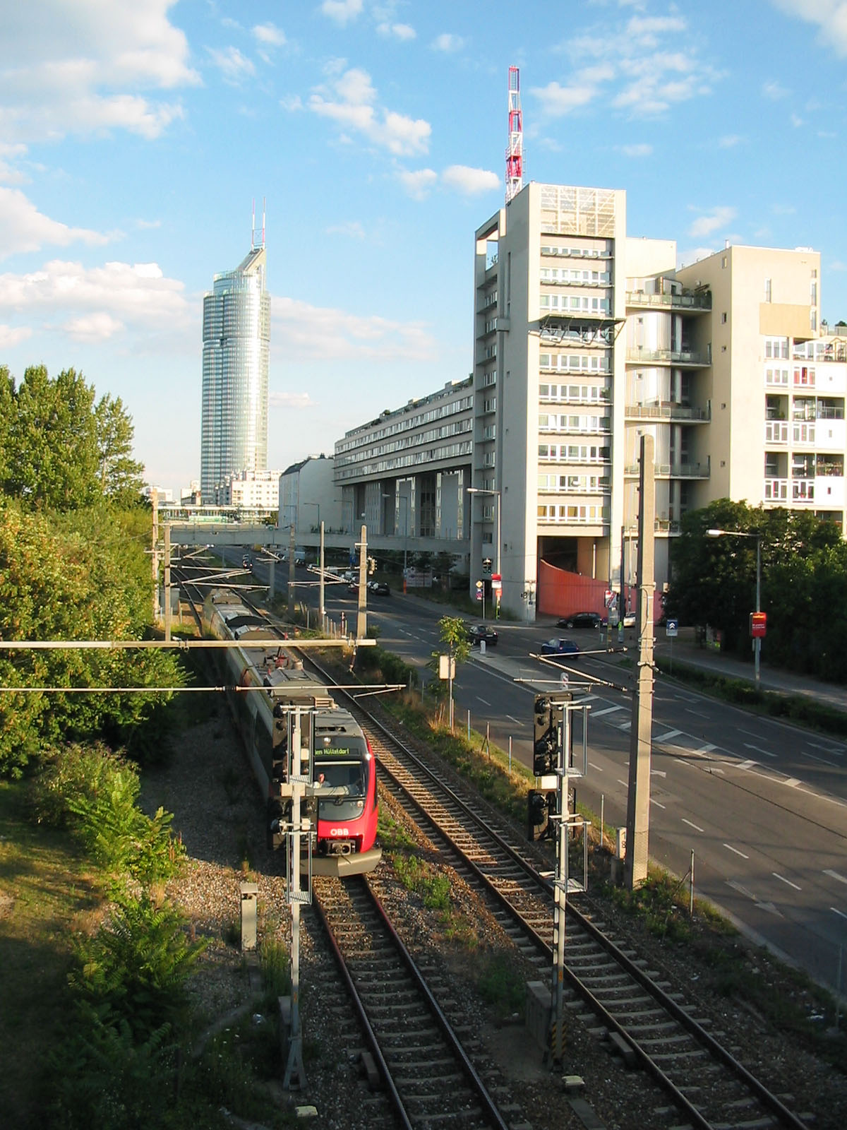 Millennium Tower and Handelskai, Vienna, from up on Floridsdorfer Brücke